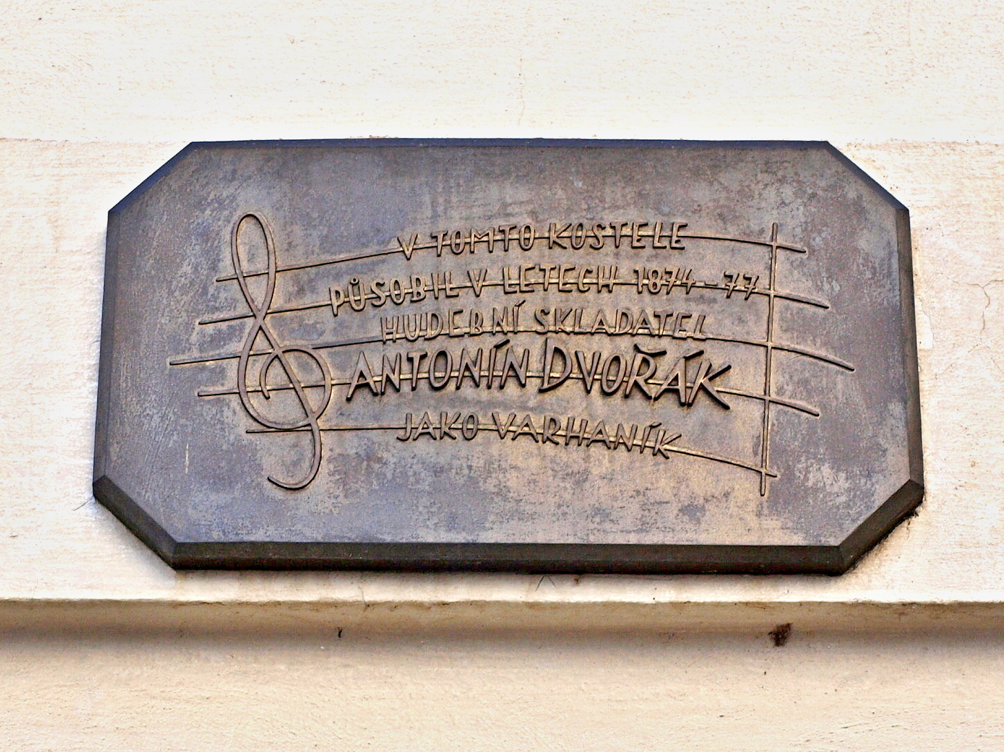 Praha 1-Nové Město, kostel sv. Vojtěcha